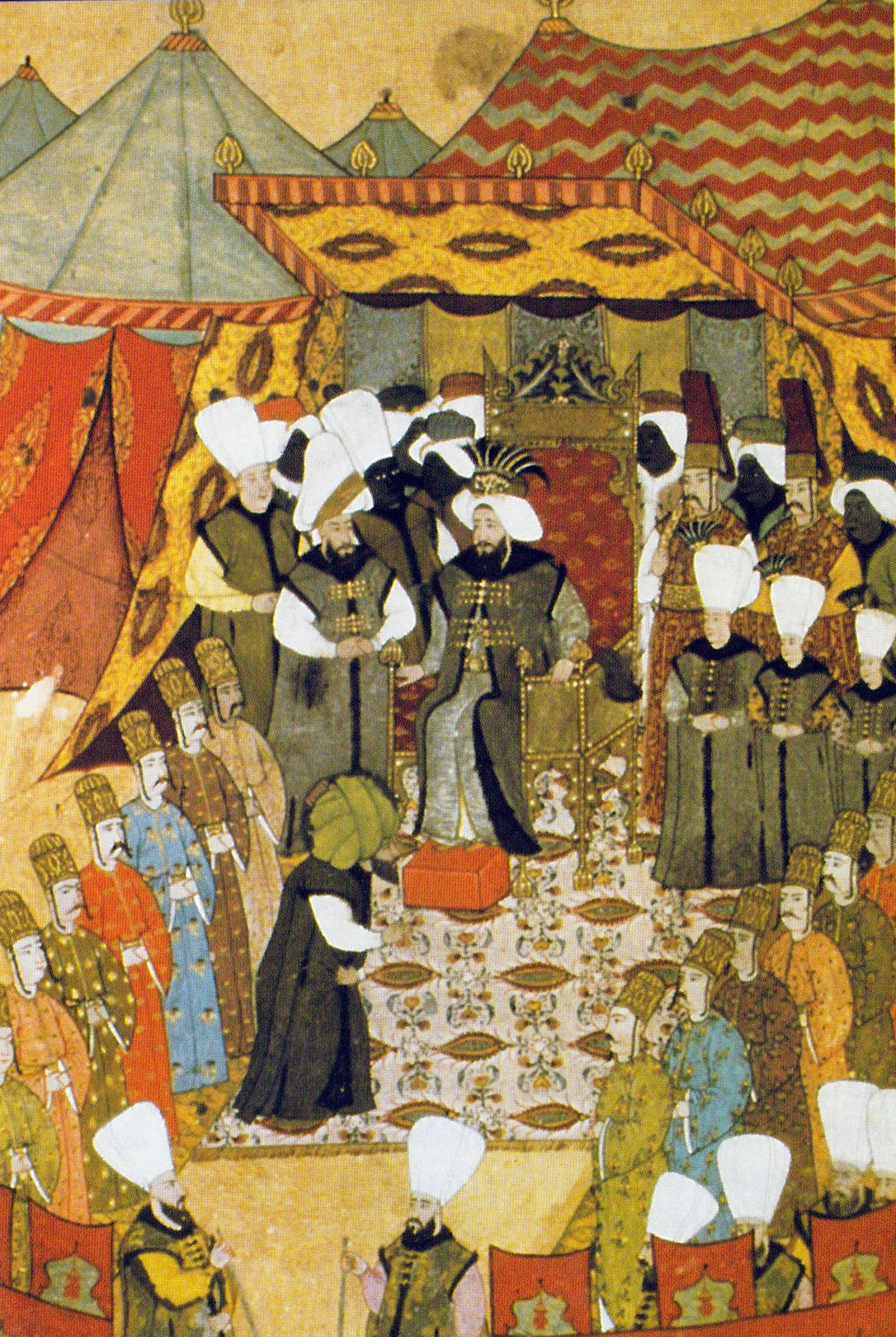 Miniature de Levni illustrant le Livre des fêtes de Vehbi. 1720